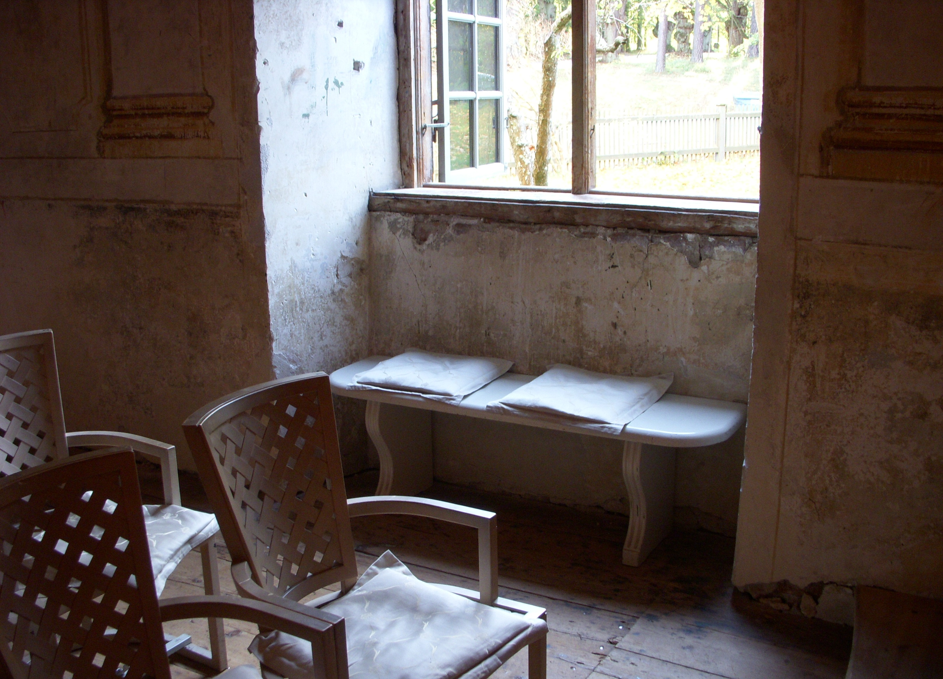 Ulriksdals slottsteater, salong